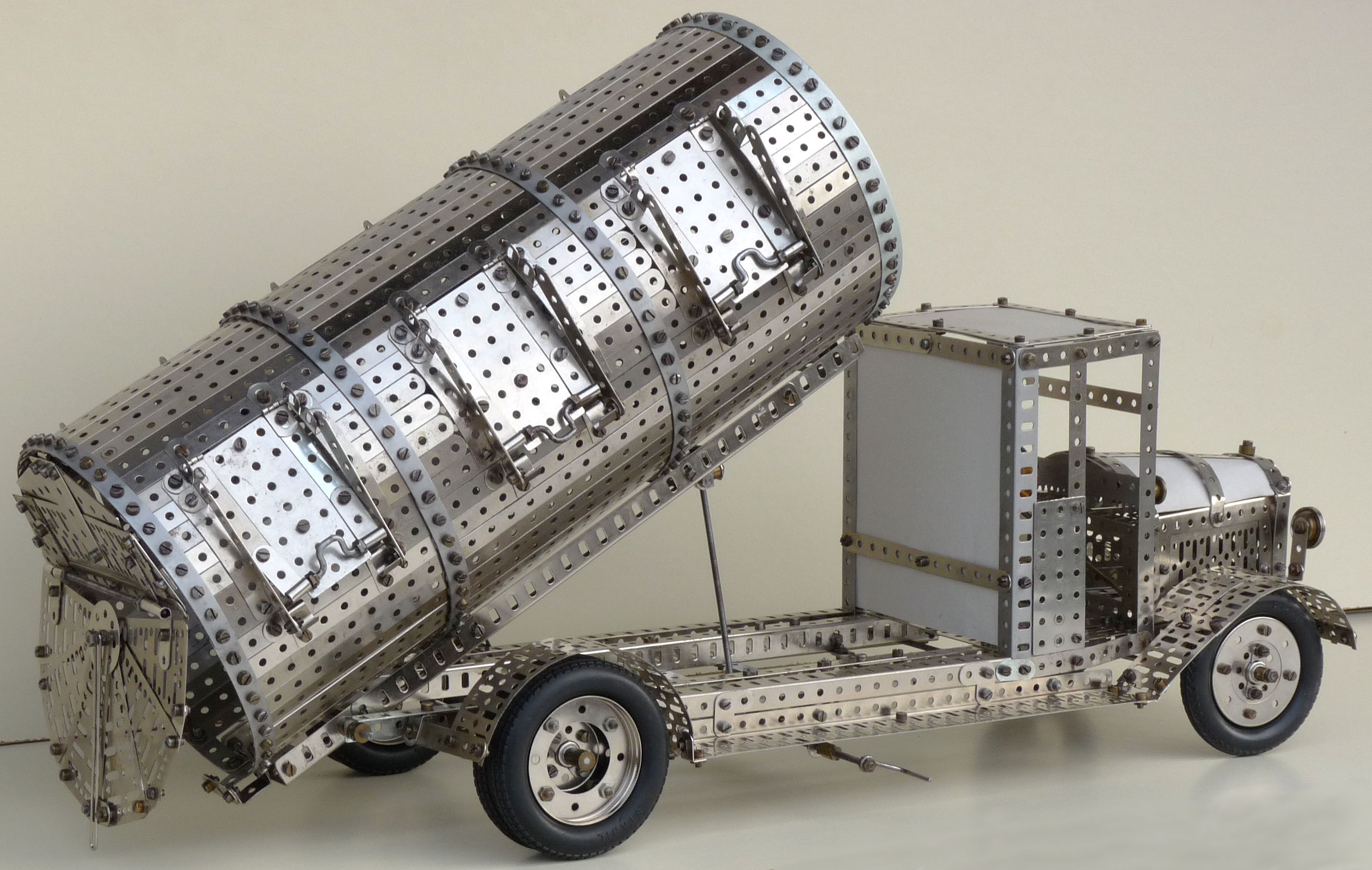 Modell eines Müllautos gebaut mit Großkasten 55. Solche Müllautos wurden um 1930 in Berlin eingesetzt.